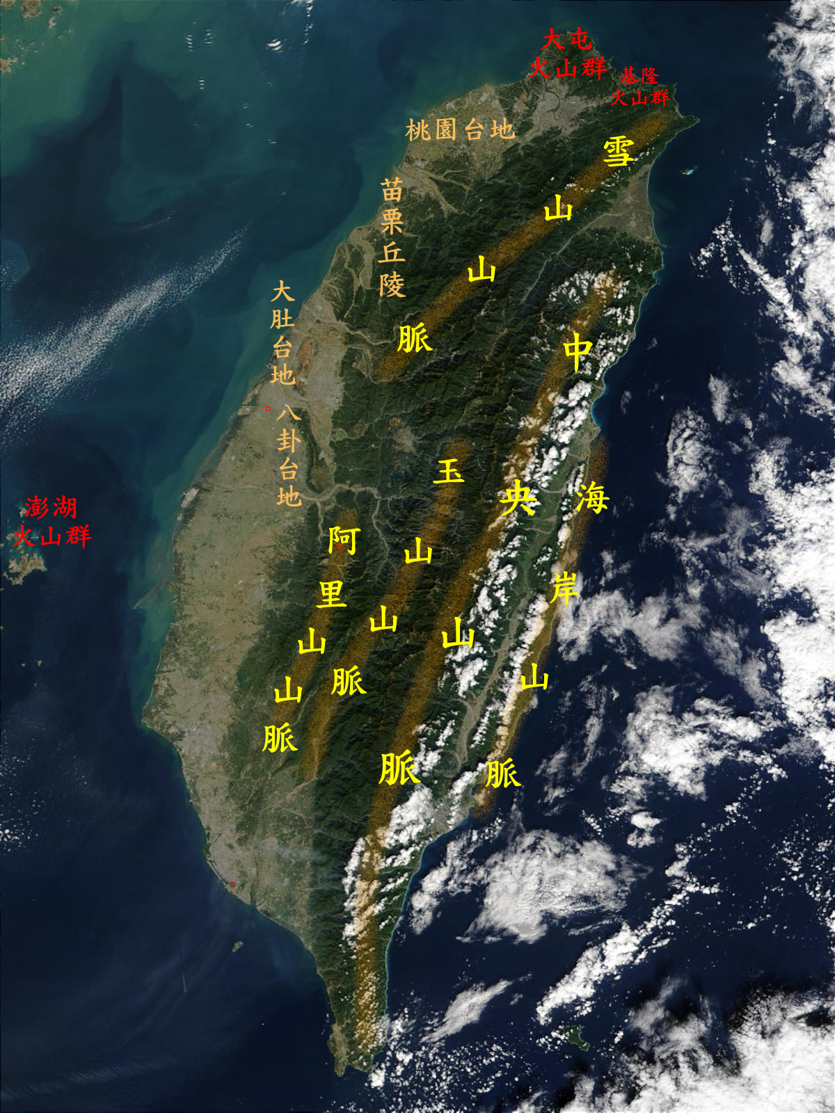 台灣山脈分布圖 Bân-lâm-gú: Tâi-uân suann-me̍h hun-pòo-tôo